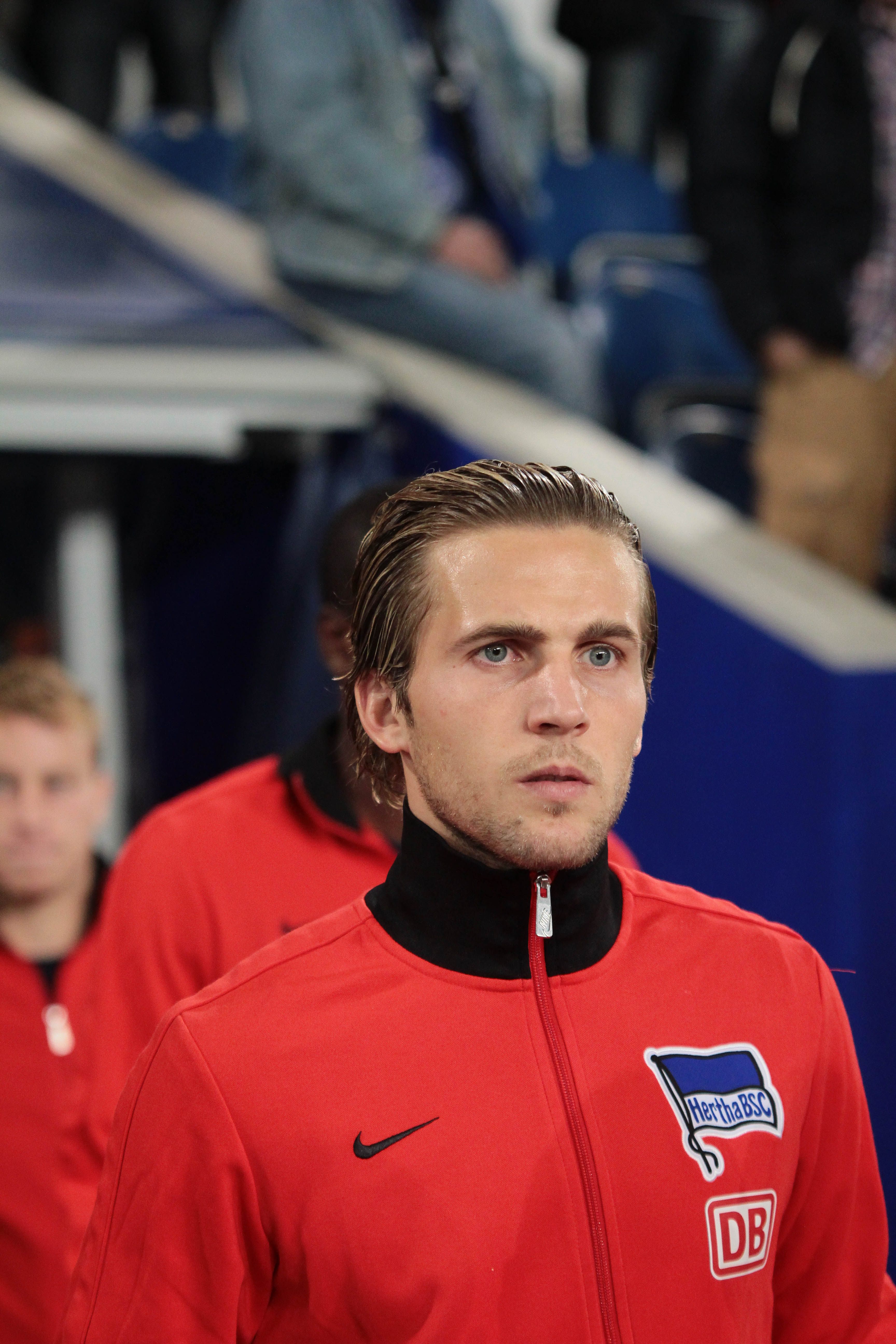 Slovak footballer Peter Pekarík, Hertha BSC